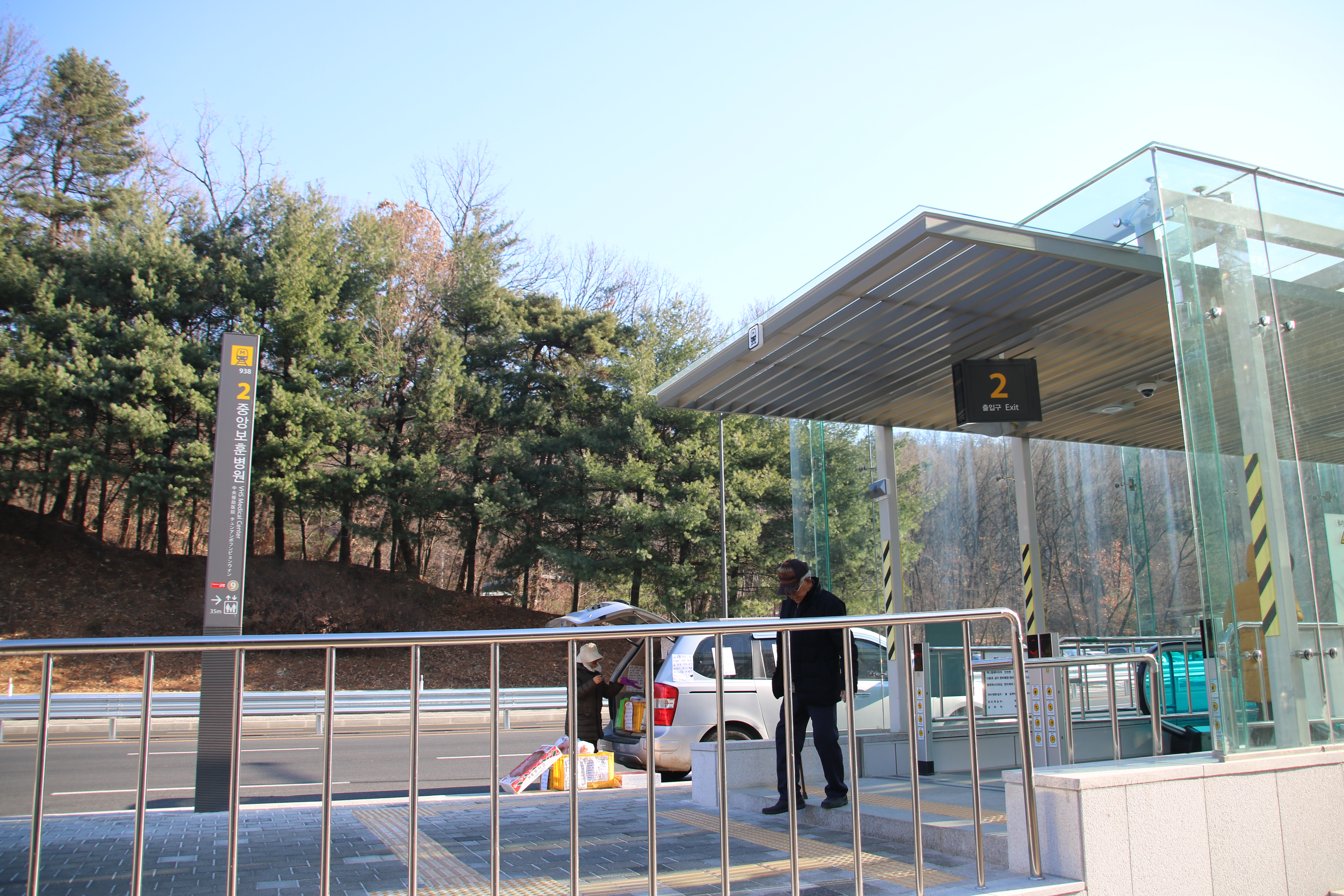 중앙보훈병원역 2번 출입구